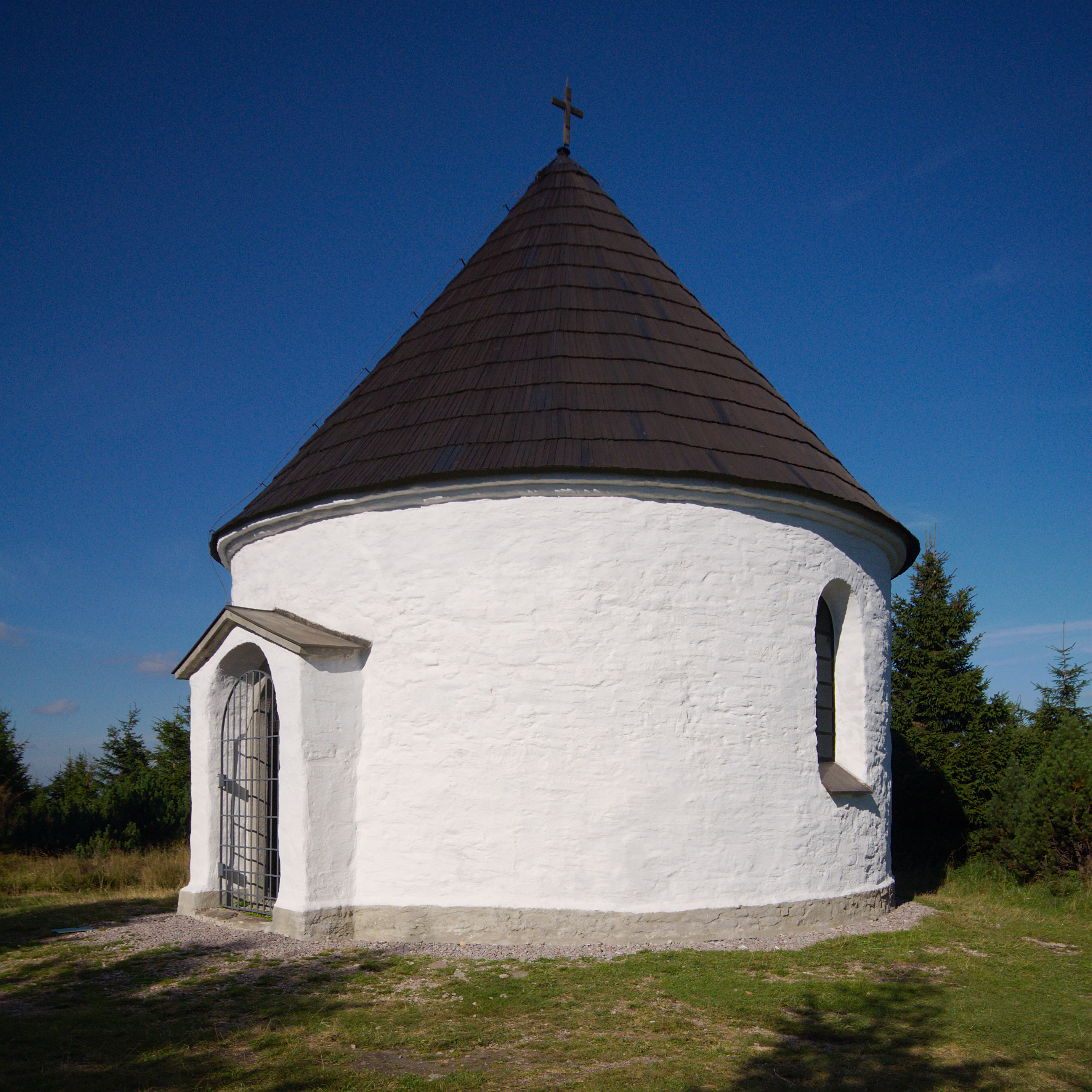 Kunštátská kaple, Zdobnice, okres Rychnov nad Kněžnou